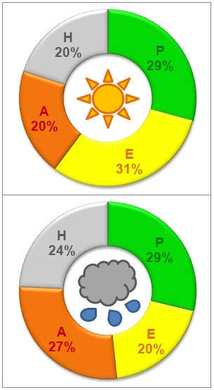 Contribution saisons ensoleillement et précipitations Lannemezan